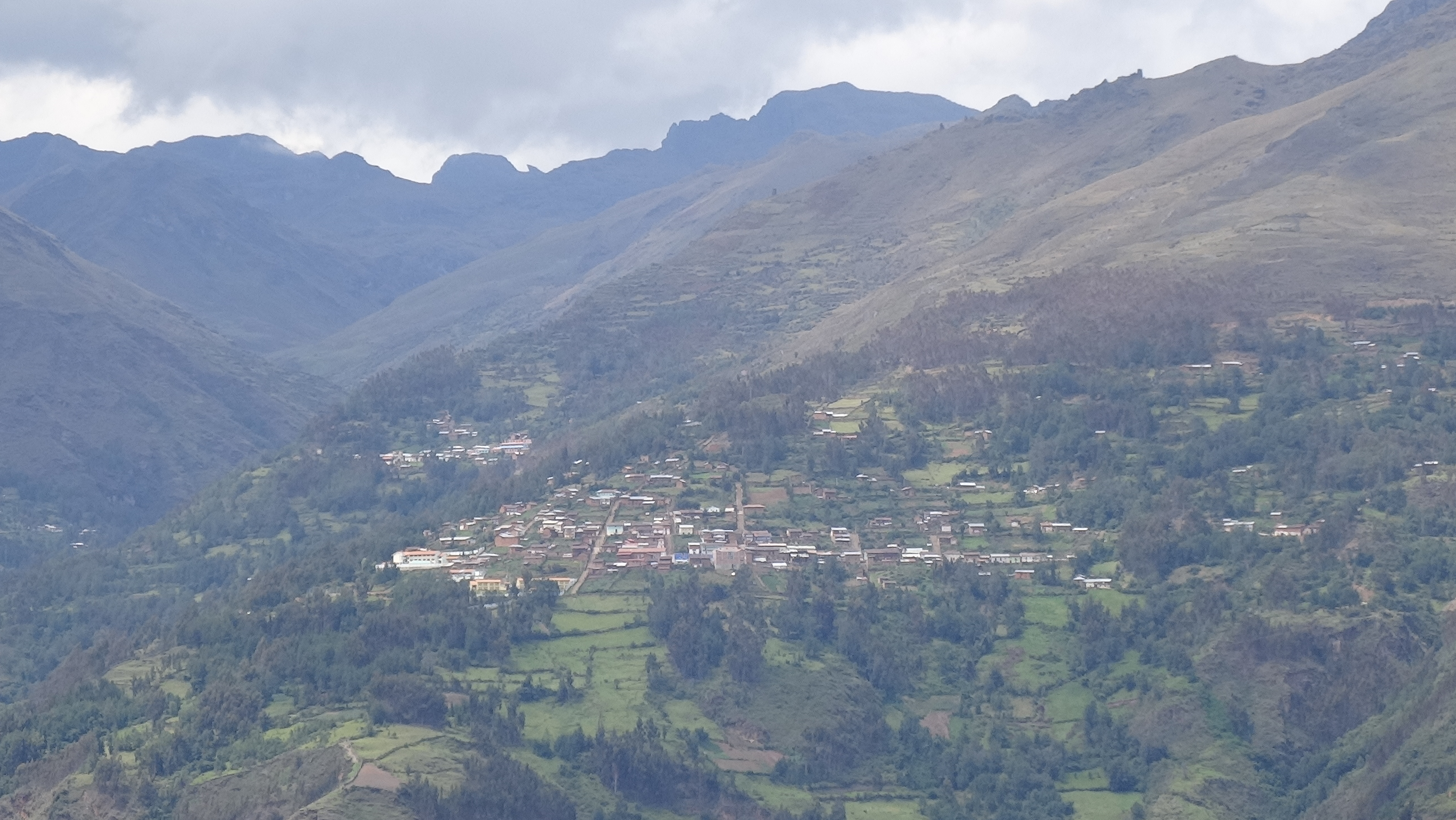 Vista de una parte del distrito de Huacchis, teniendo como centro a la capital homónima, visto desde las ruinas Tambo de Arancay.